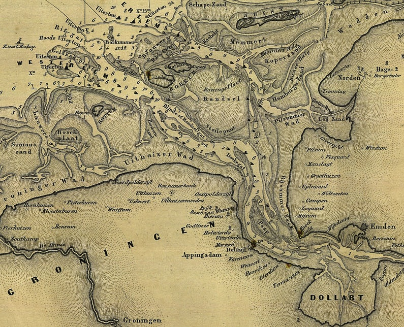 Uitsnede Eems uit Zeekaart van de Noordzee, 1883